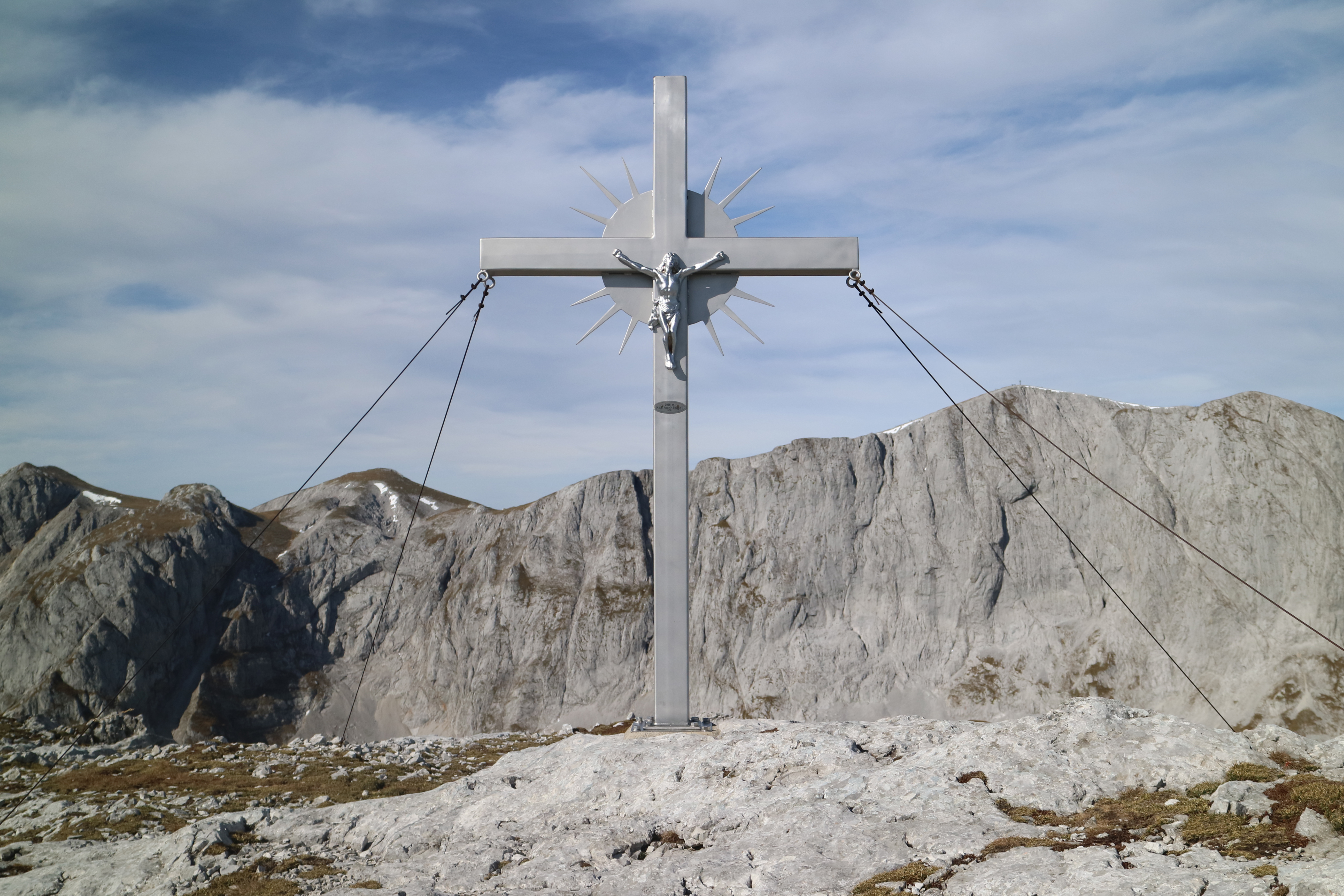 Gipfelkreuz am Karlhochkogel, im Hintergrund der Hochschwab (Steiermark)